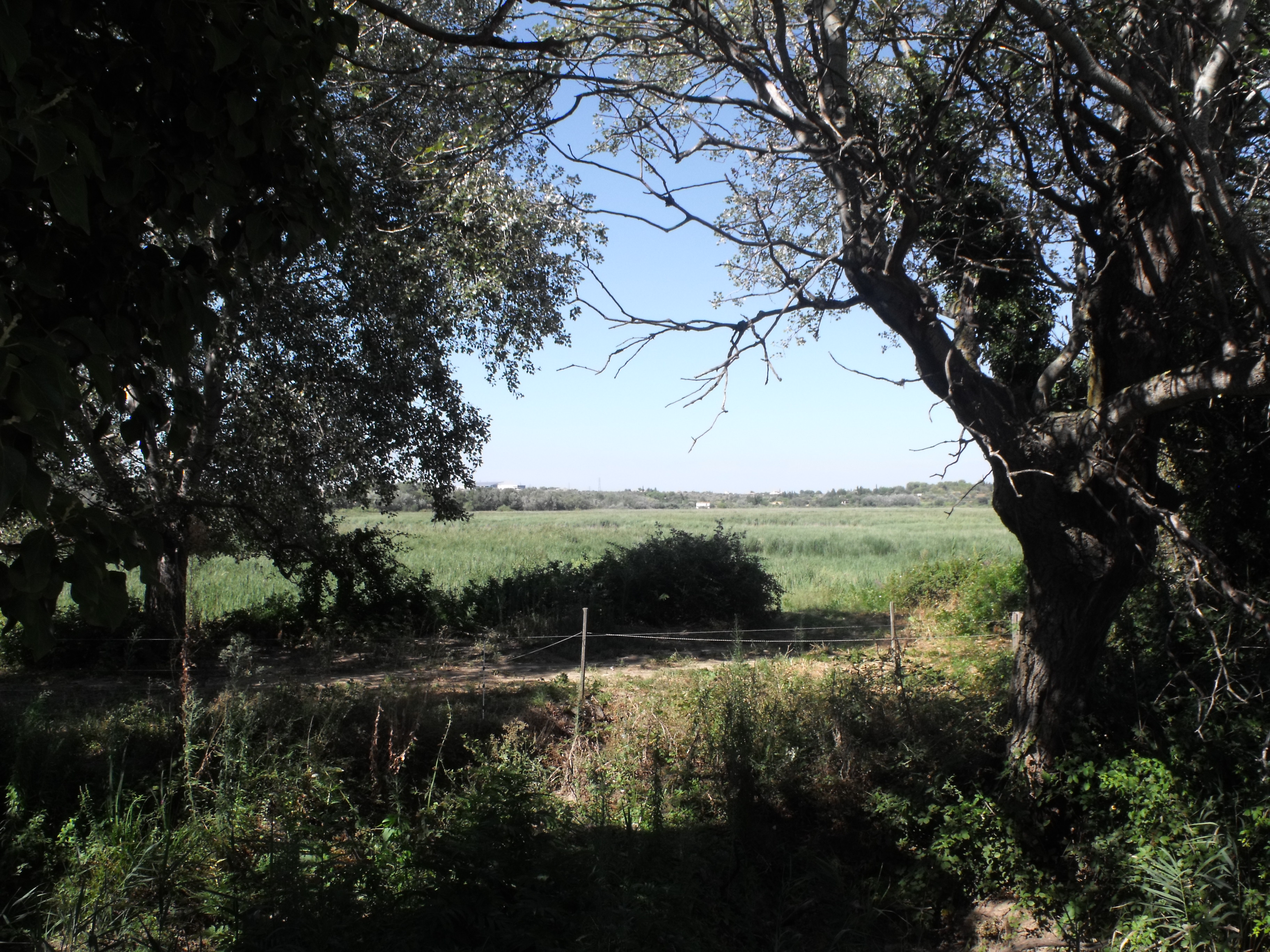 Réserve naturelle nationale de l'Estagnol - Villeneuve les Maguelone, Hérault, France